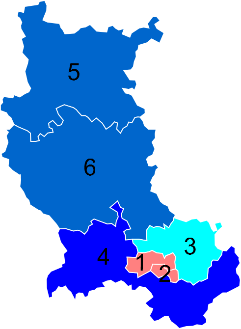 Résultats des élections législatives de la Loire en 2012